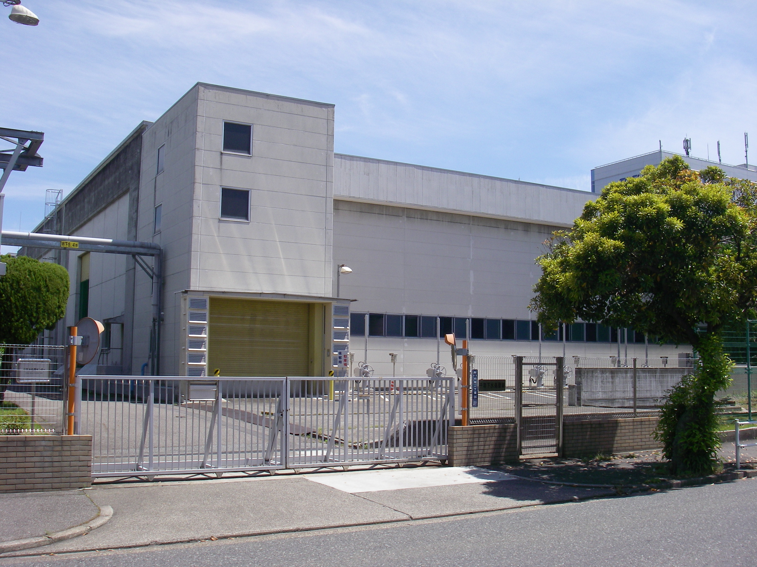 千年水処理センター（愛知県名古屋市熱田区） 堀川下流域に位置し、処理水は堀川に放流されている。